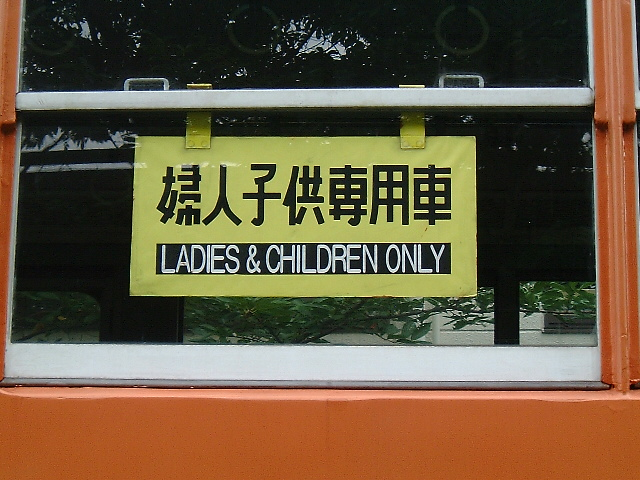 国鉄で使用されていた「婦人子供専用車」のプレート。JR東日本大井工場にて撮影